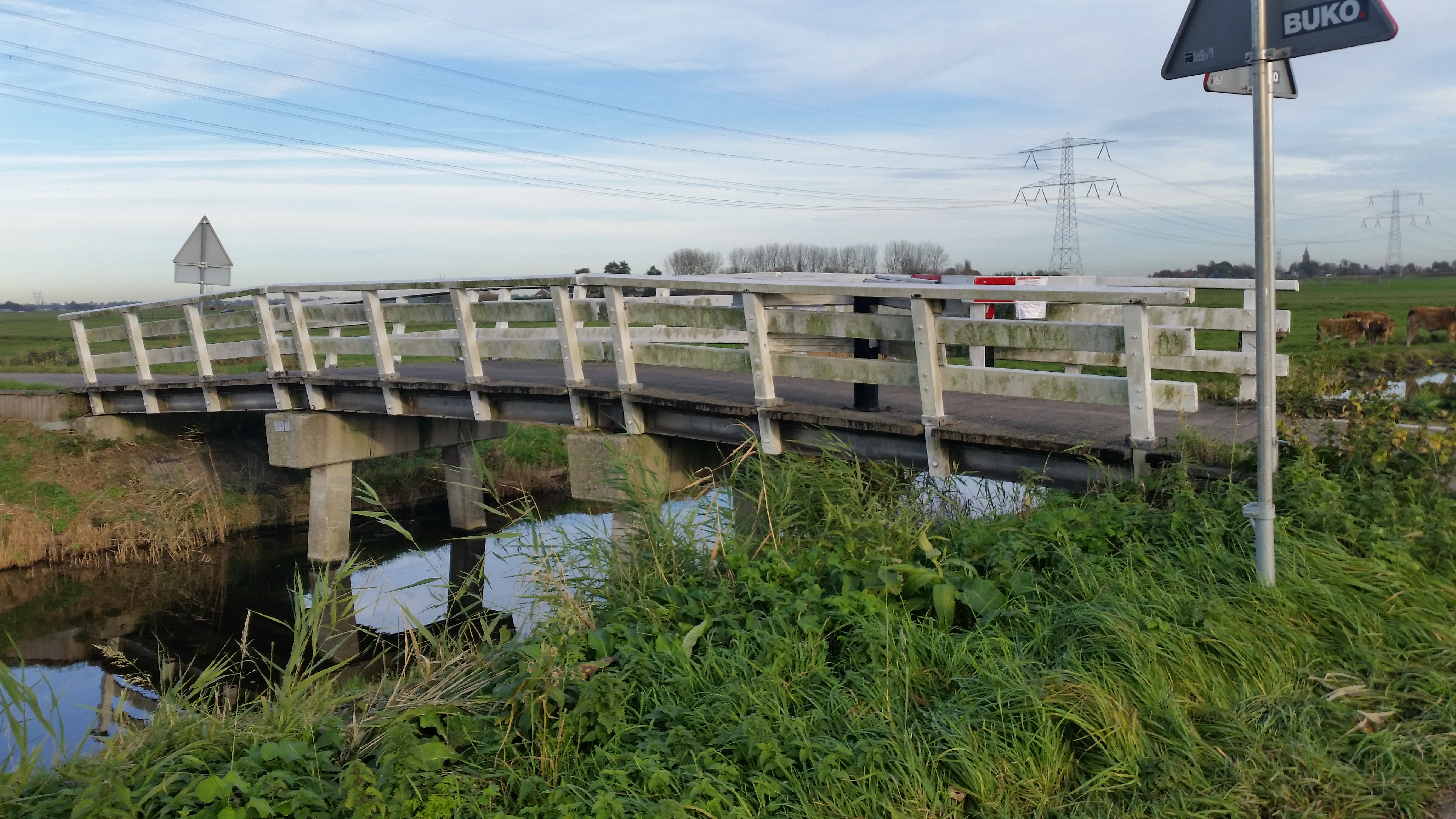 Zijaanzicht van Brug 1733, Oude Tramwegbrug, vanaf Buikslotermeerdijk